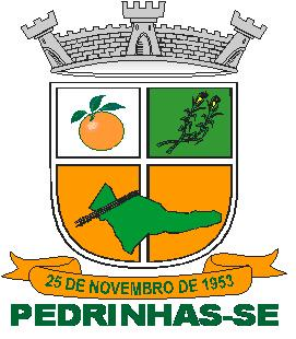 Brasão Municipal de Pedrinhas-SE